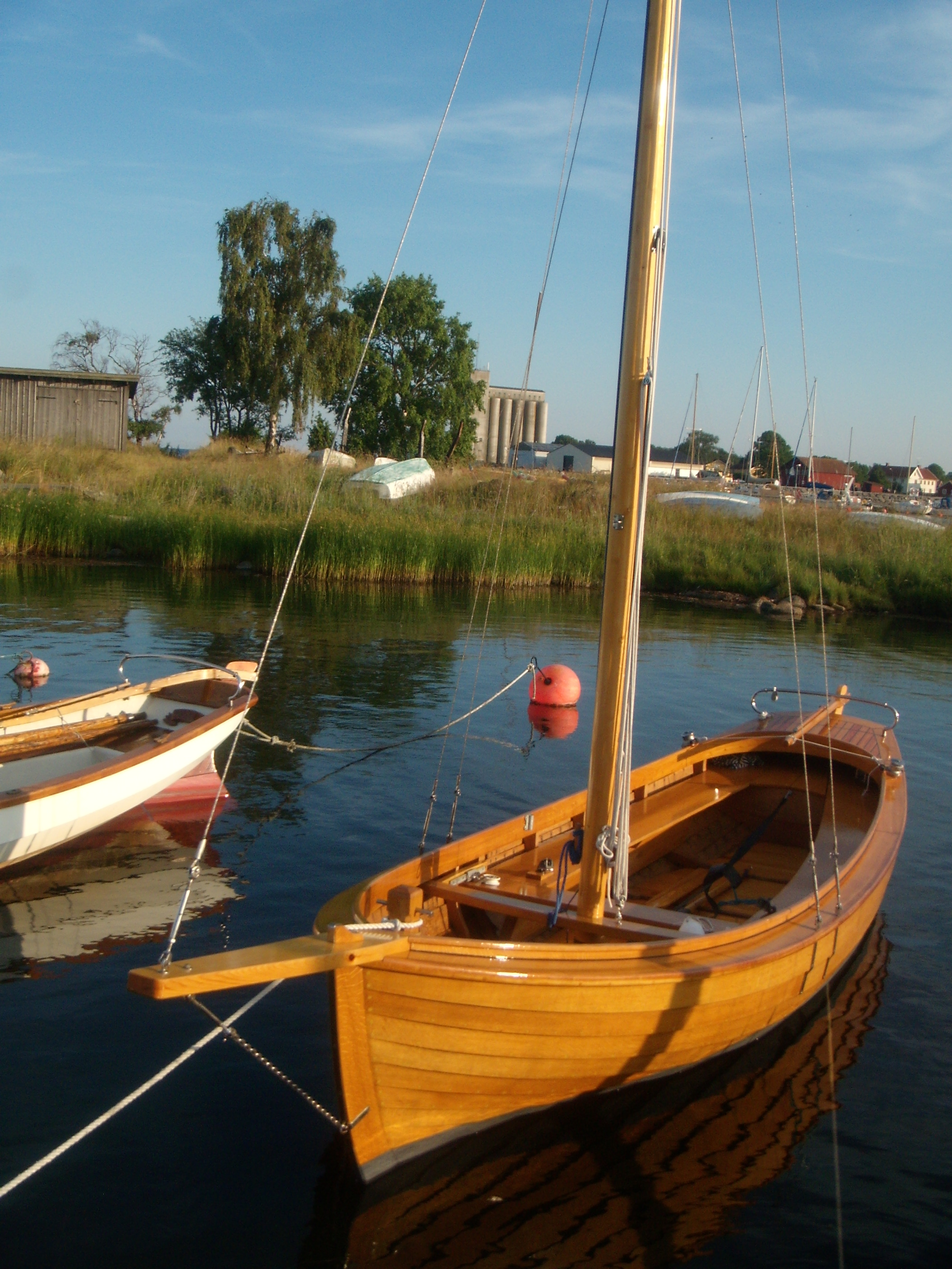 Foto:Boatbuilder.